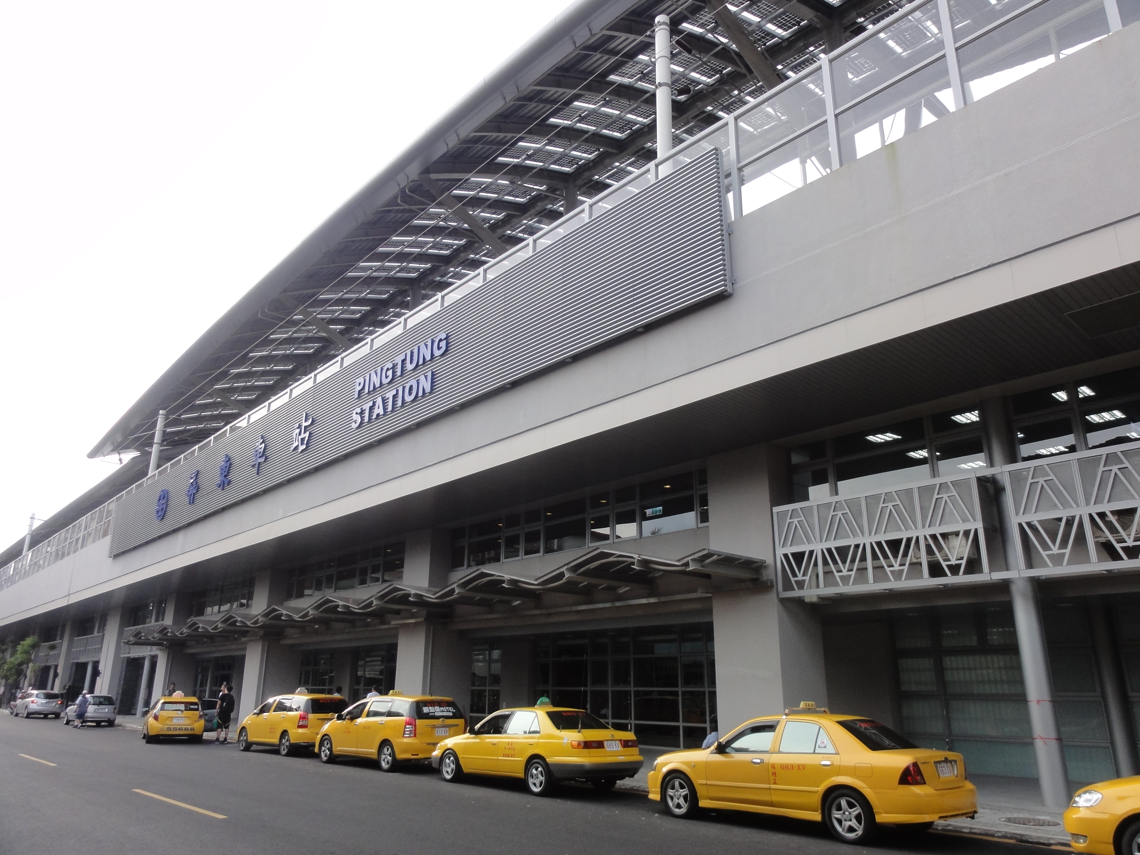 屏東車站